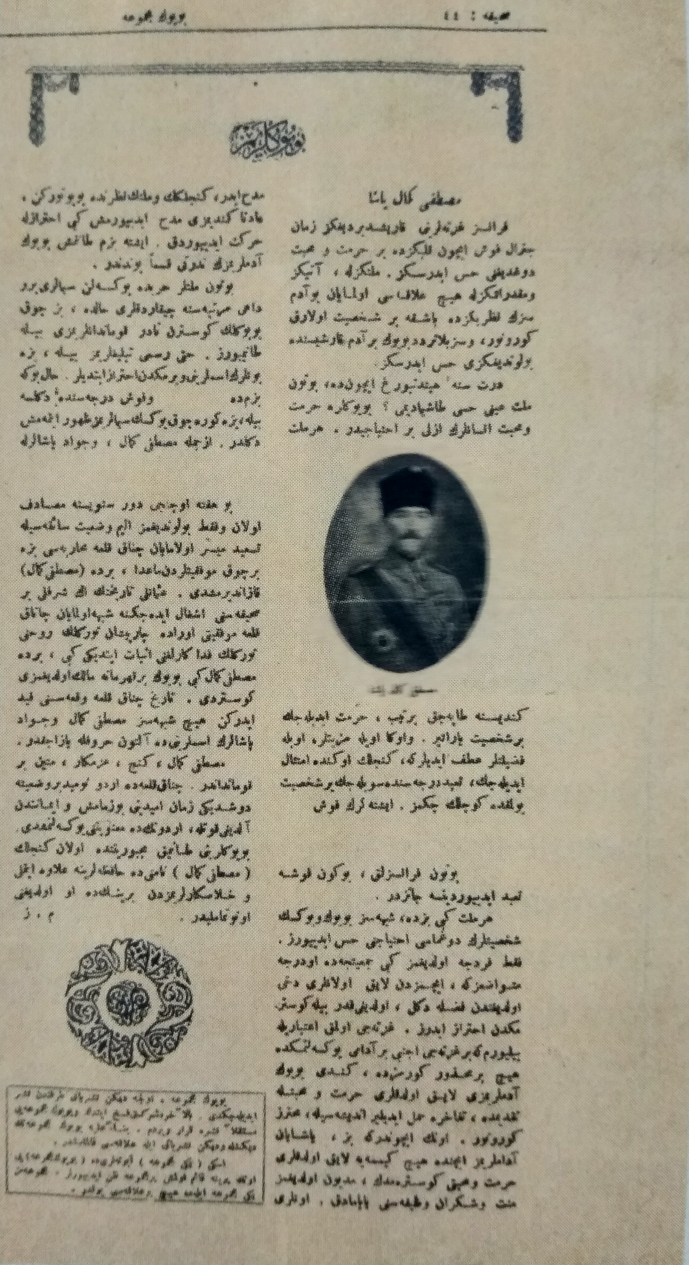 Mehmet Zekeriya Sertel'in Büyük Mecmua'nın 20 Mart 1919 tarihli 3. sayısının 44. sayfasında çıkan "Büyüklerimiz - Mustafa Kemal Paşa" başlıklı yazısı.